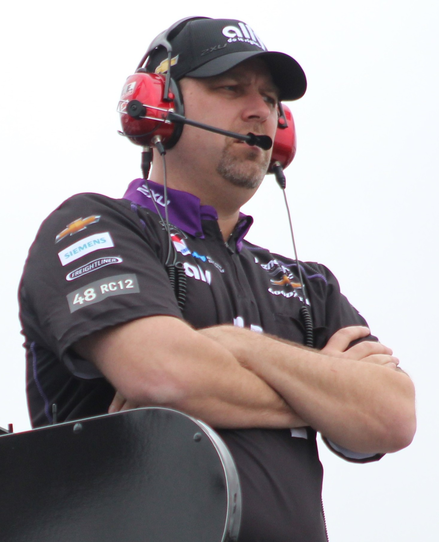 2019 Daytona 500